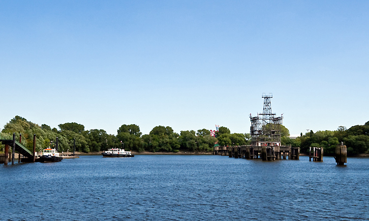 Der Köhlfleethafen ist ein über 200 m breites und 13 m tiefes Hafenbecken im Hamburger Hafen mit einer stillgelegten Ölumschlaganlage und einer Mittelpier mit Liegeplätzen für zwei Tanker. Das Hafenbecken wurden von Herbst 1960 bis Sommer 1963 ausgebaggert.